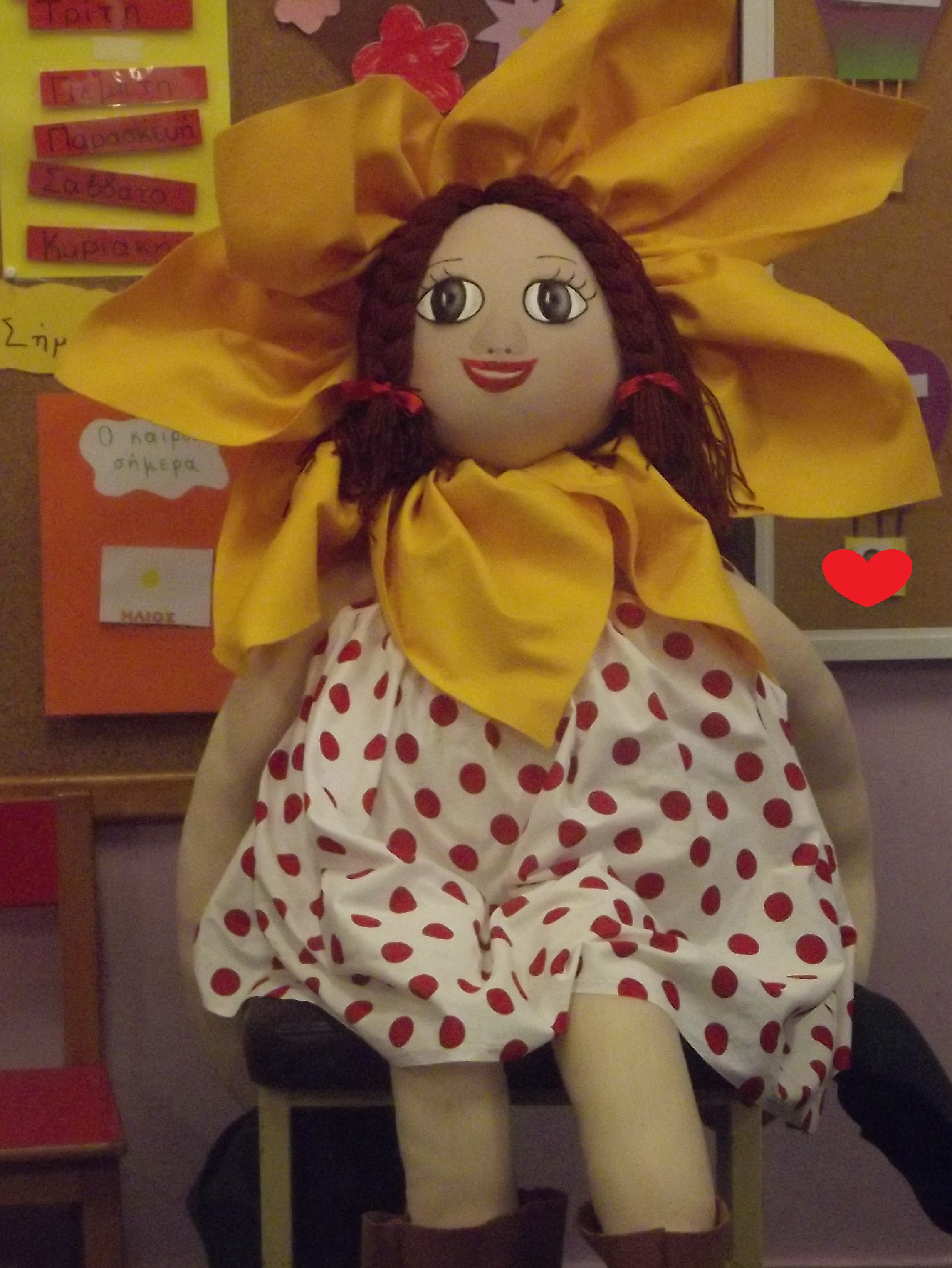 Γιγαντόκουκλα του κουκλοθεάτρου Κιλκίς